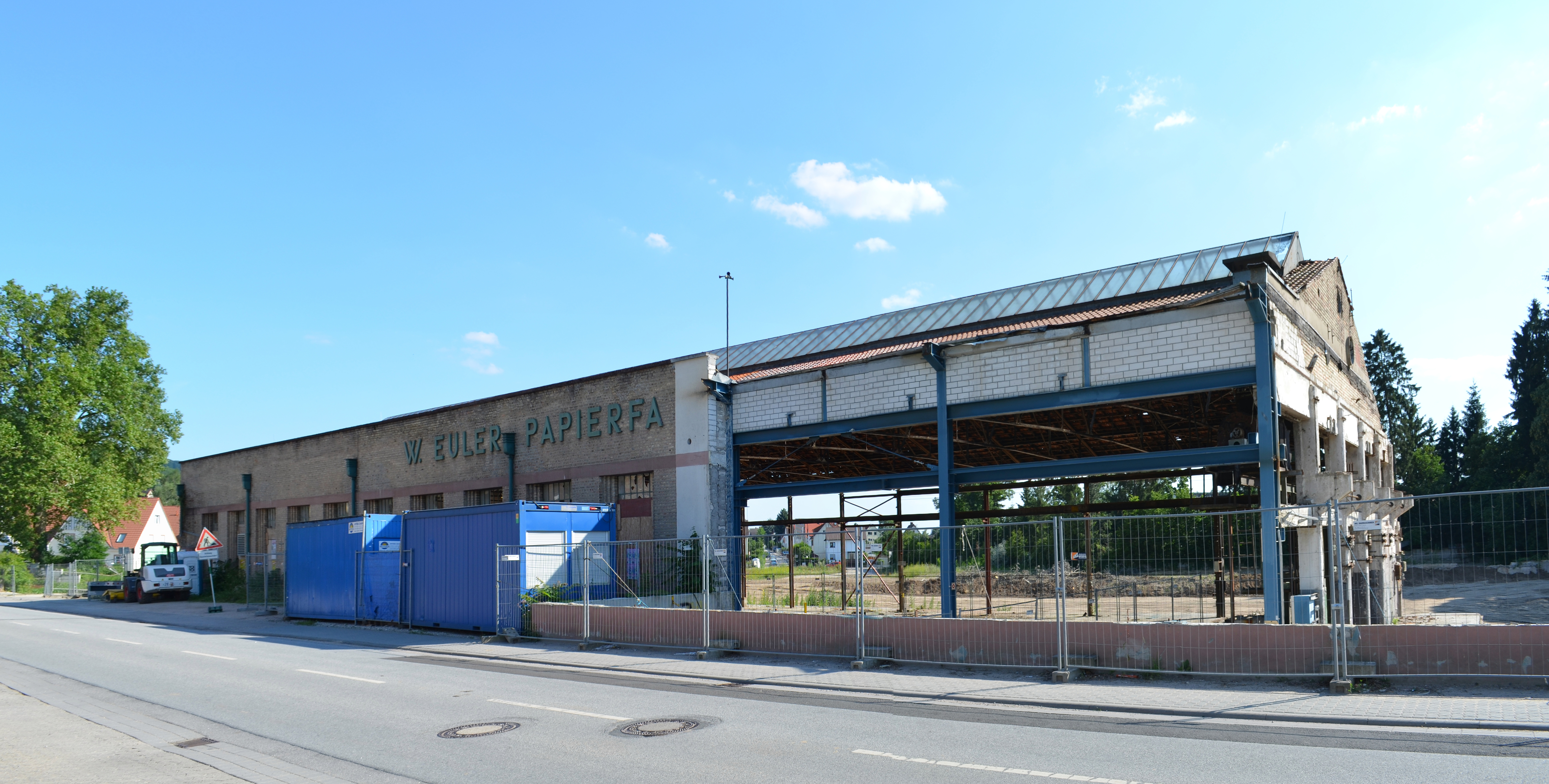 Bensheim. Friedhofstraße, Papierfabrik Euler